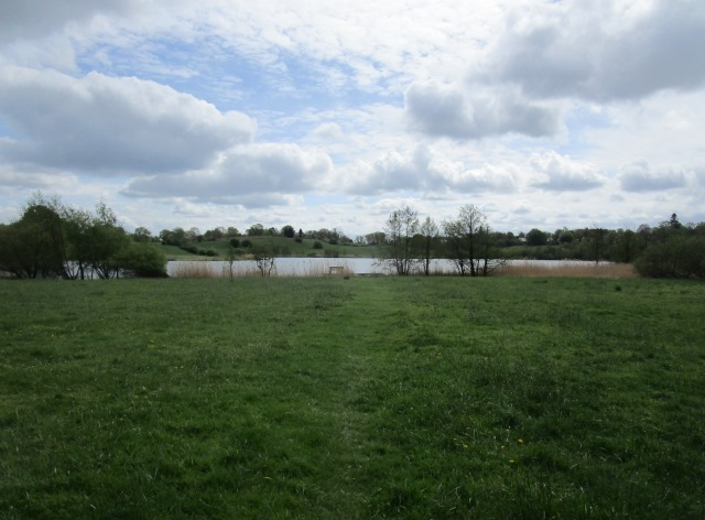 Brudesø (tysk: Brautsee) i Slesvig-Skt. Jørgen